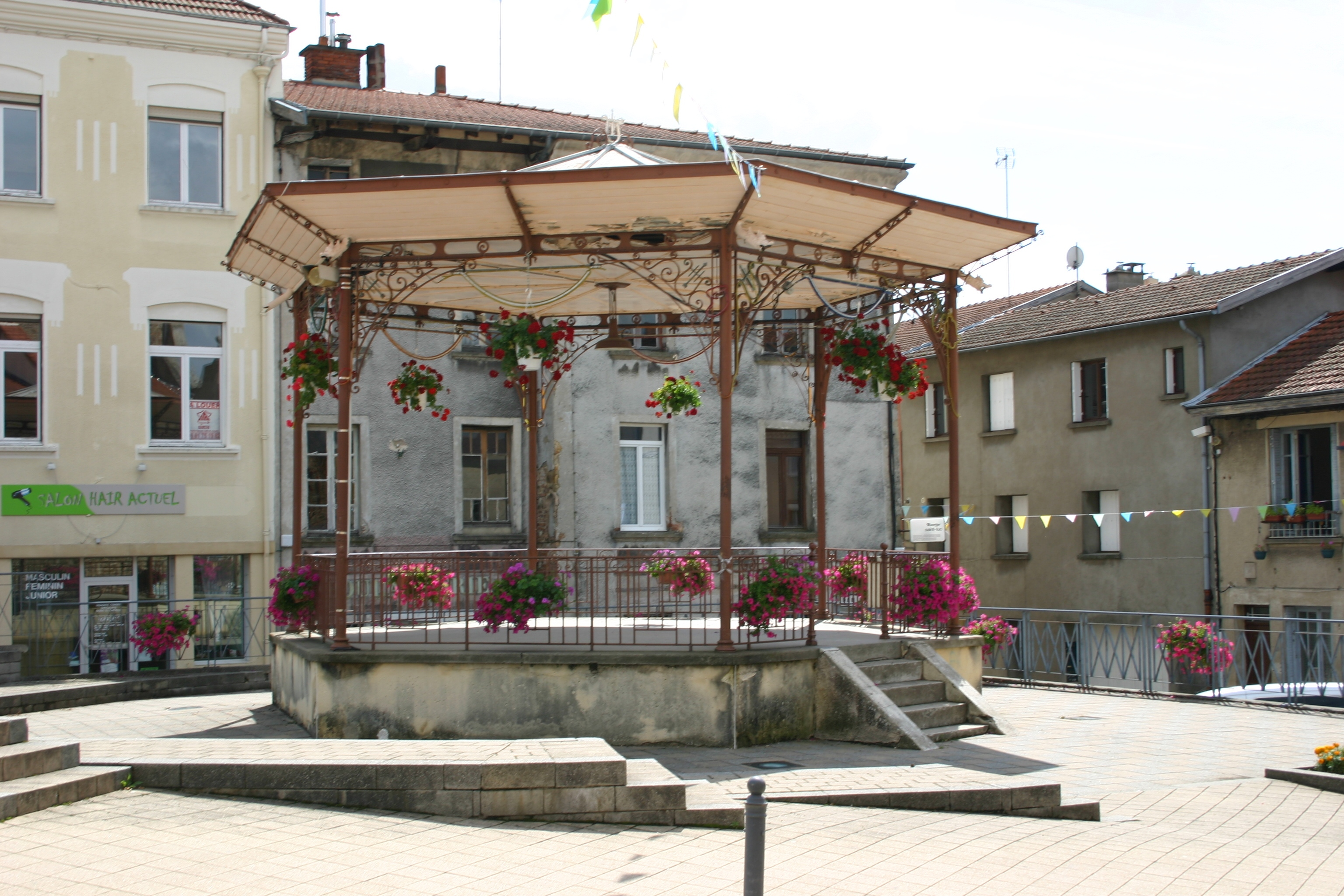 Kiosque de Bussières dans le département de la Loire.